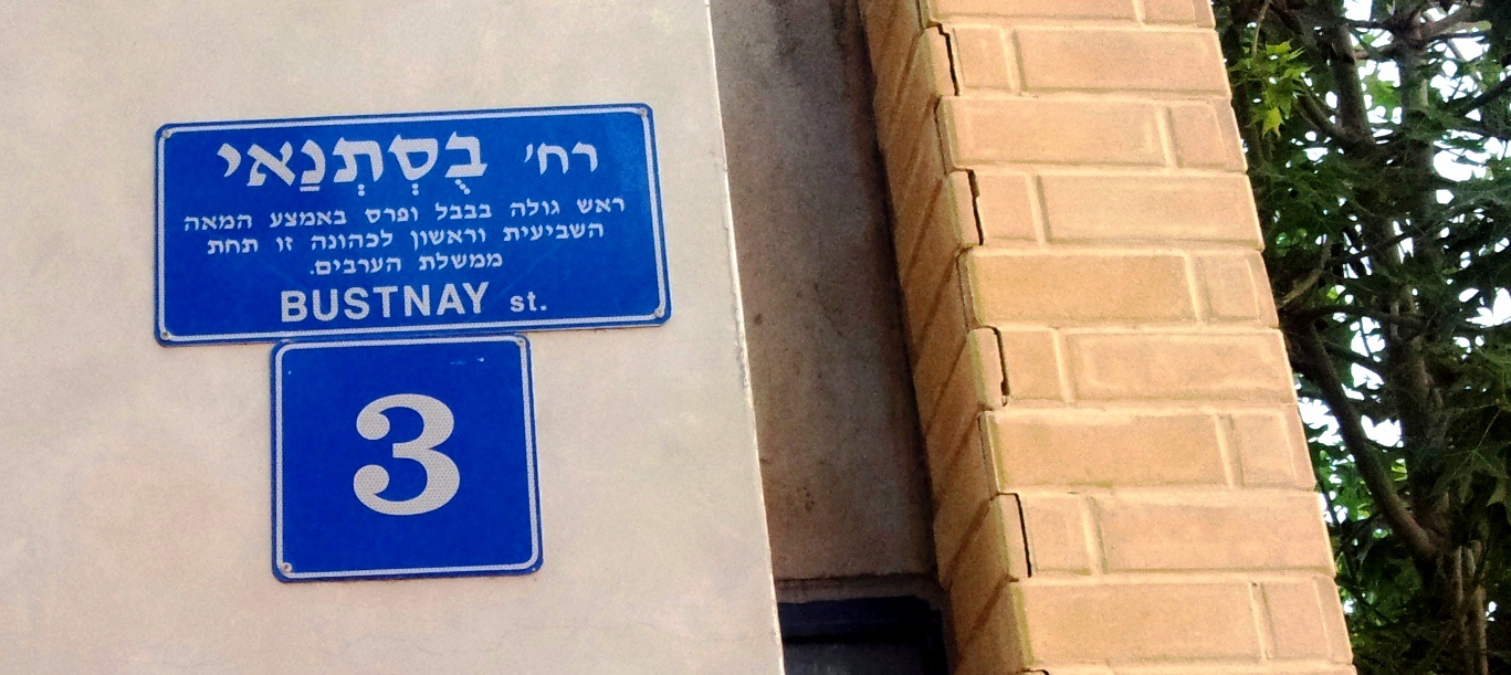 רחוב בוסתנאי בשכונת נווה צדק בתל אביב